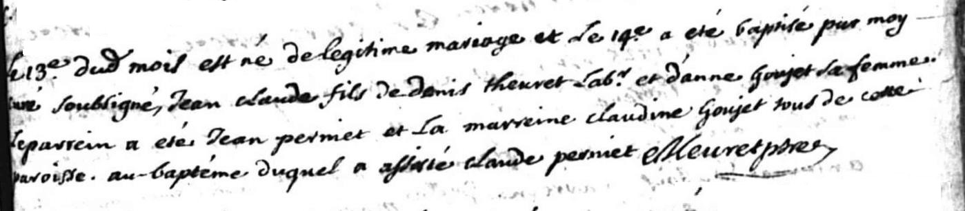 Acte de naissance de Jean Claude Theurel en date du 13 septembre 1725